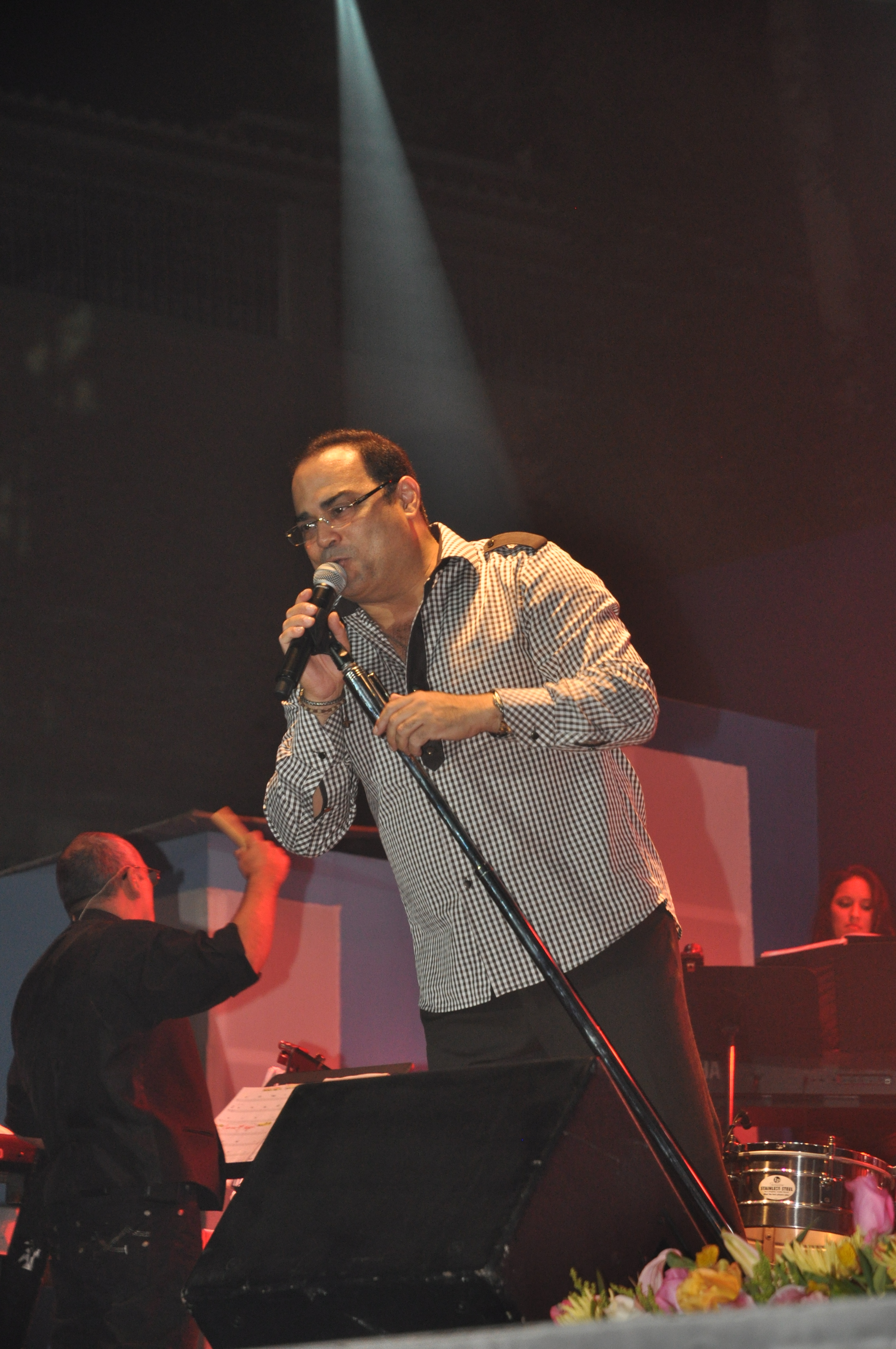 Concierto de Gilberto Santa Rosa en Piñas, Alcalde Joseph Cueva entrego de regalo una placa y cuadro del artista Luis Moscoso